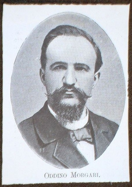 Oddino Morgari